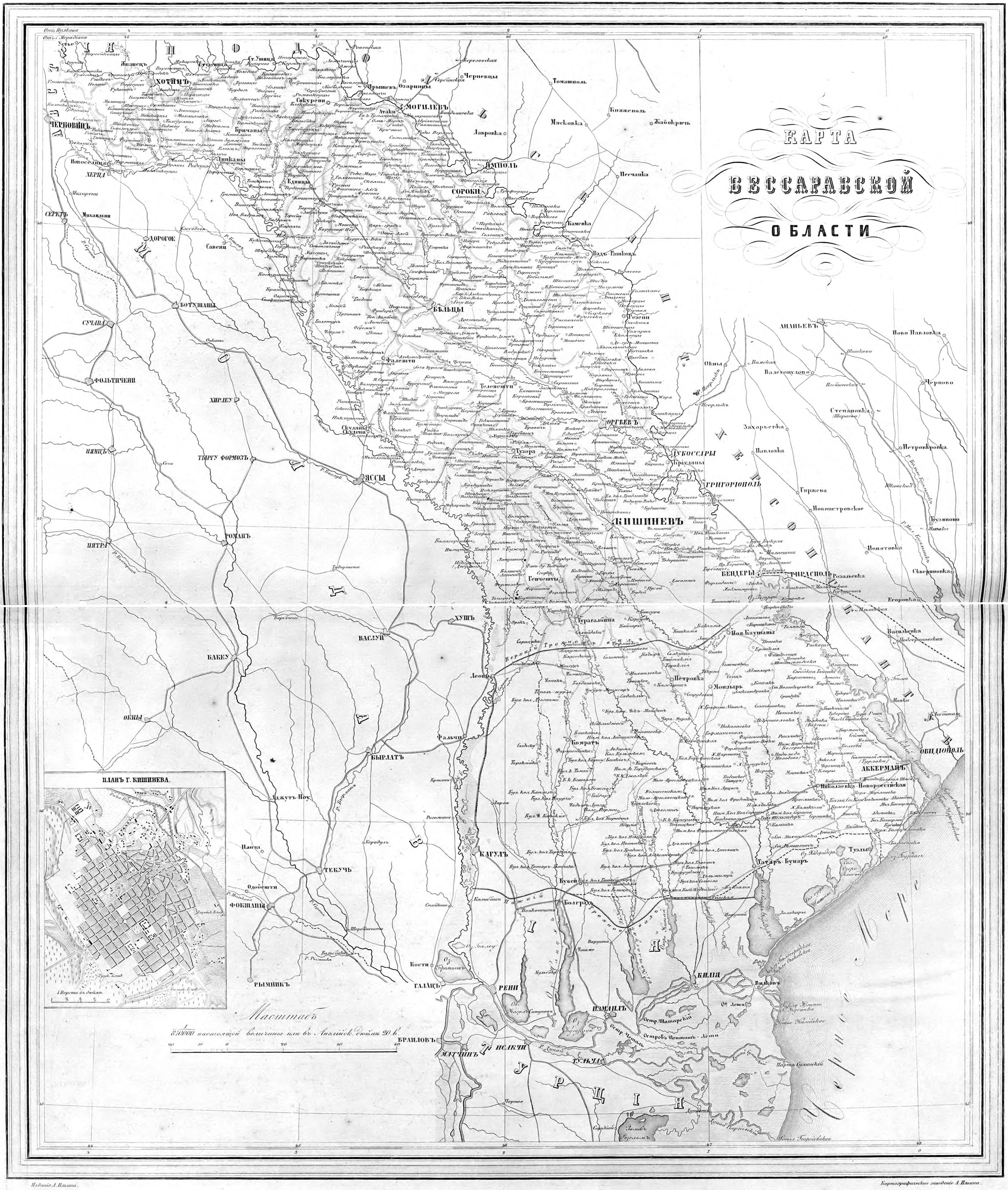 Бессарабская область 1871 год